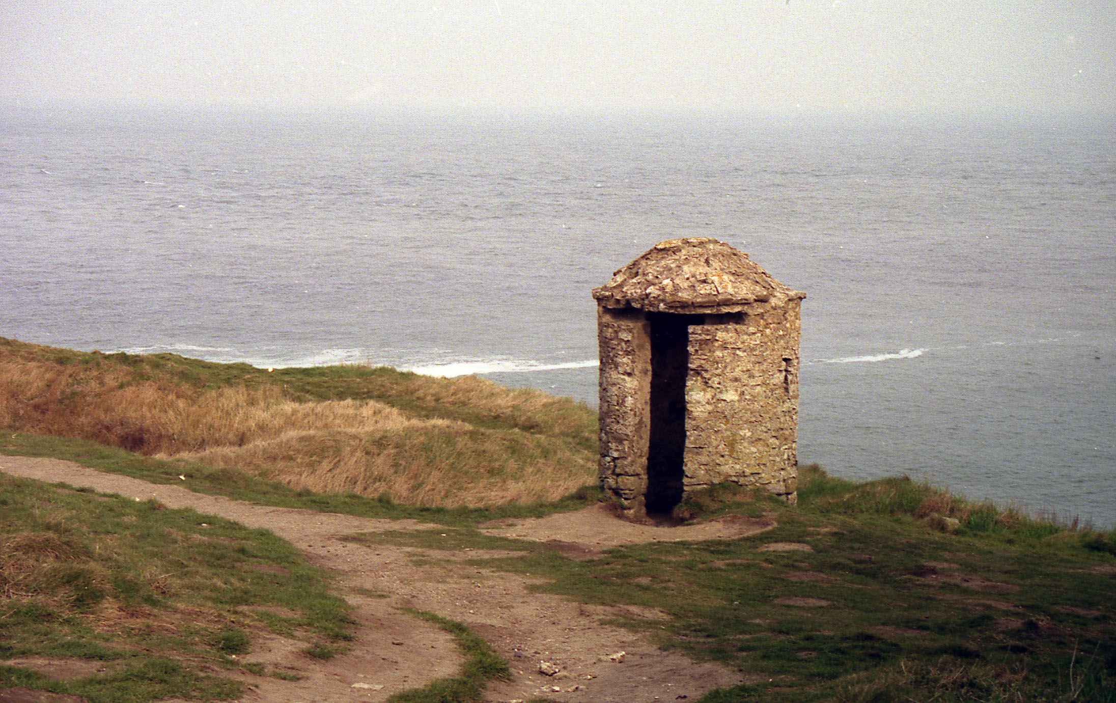 L'abri de douanier, dénommé localement guérite du perroquet de falaise.